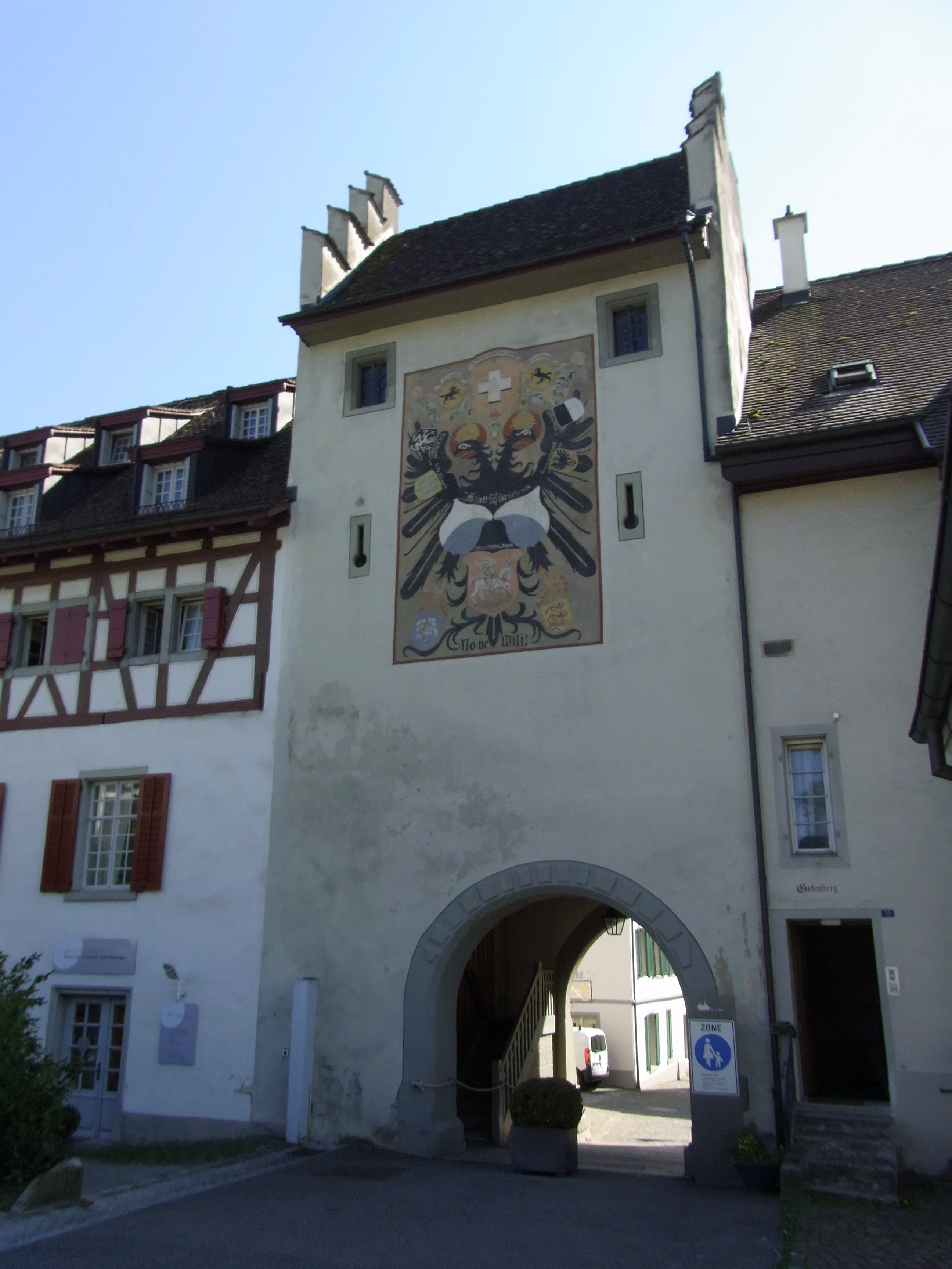 Stein am Rhein: Stadtbefestigung, Obertor